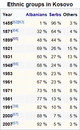 Démographique historique du Kosovo grâce aux sources Byzantines, Bulgares, Ottomans